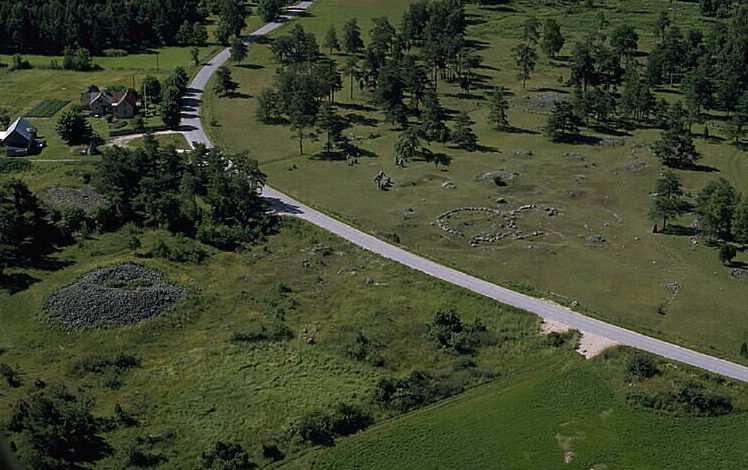 Röset till vänster i bilden. Motiv: Digerrojr Nyckelord: Flygbilder, Riksintressen Kategori: Grav- och boplatsområde Röset till vänster i bilden.